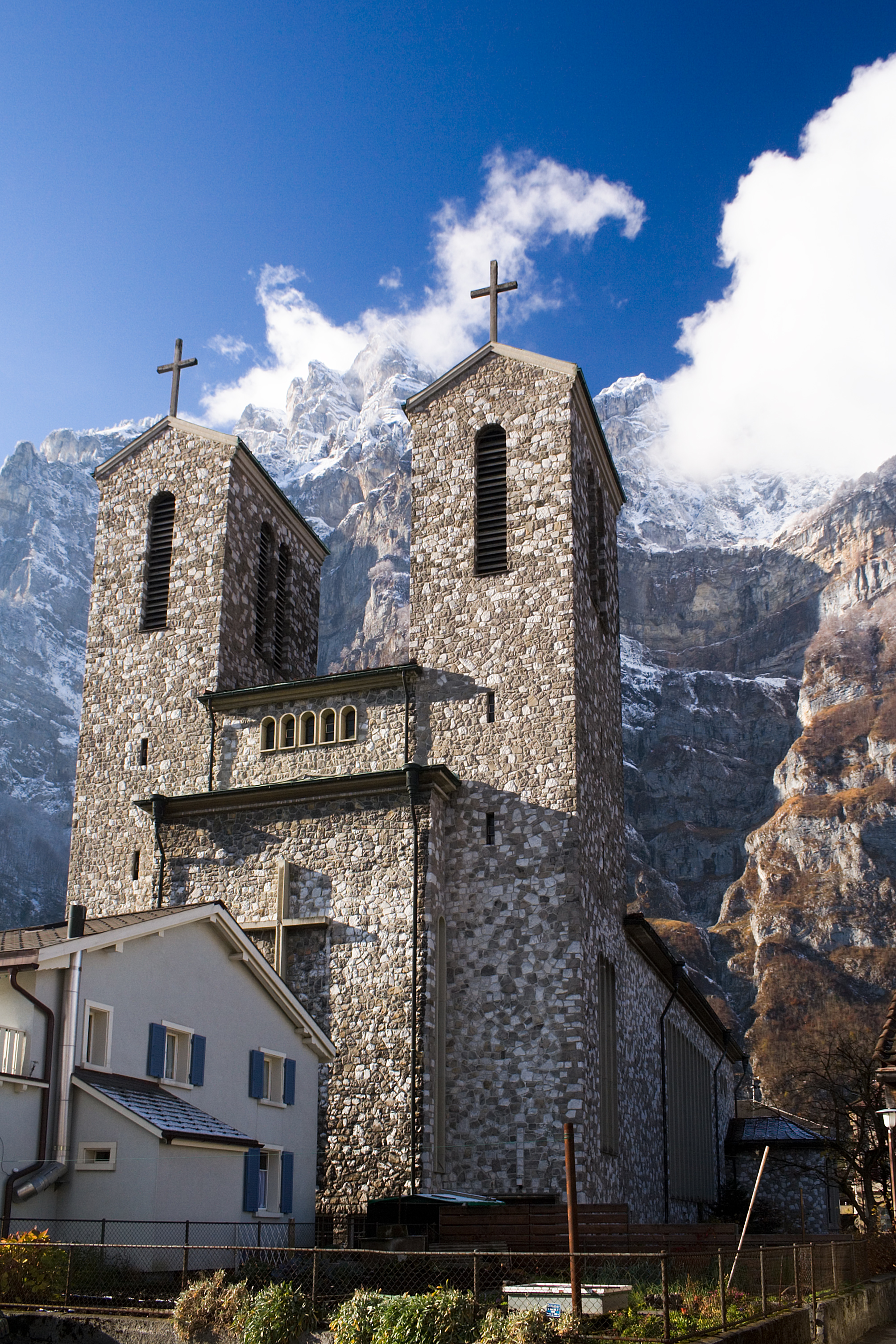 Katholische Dreikönigskirche in Netstal, SchweizErbaut 1933–34 durch Otto Linder